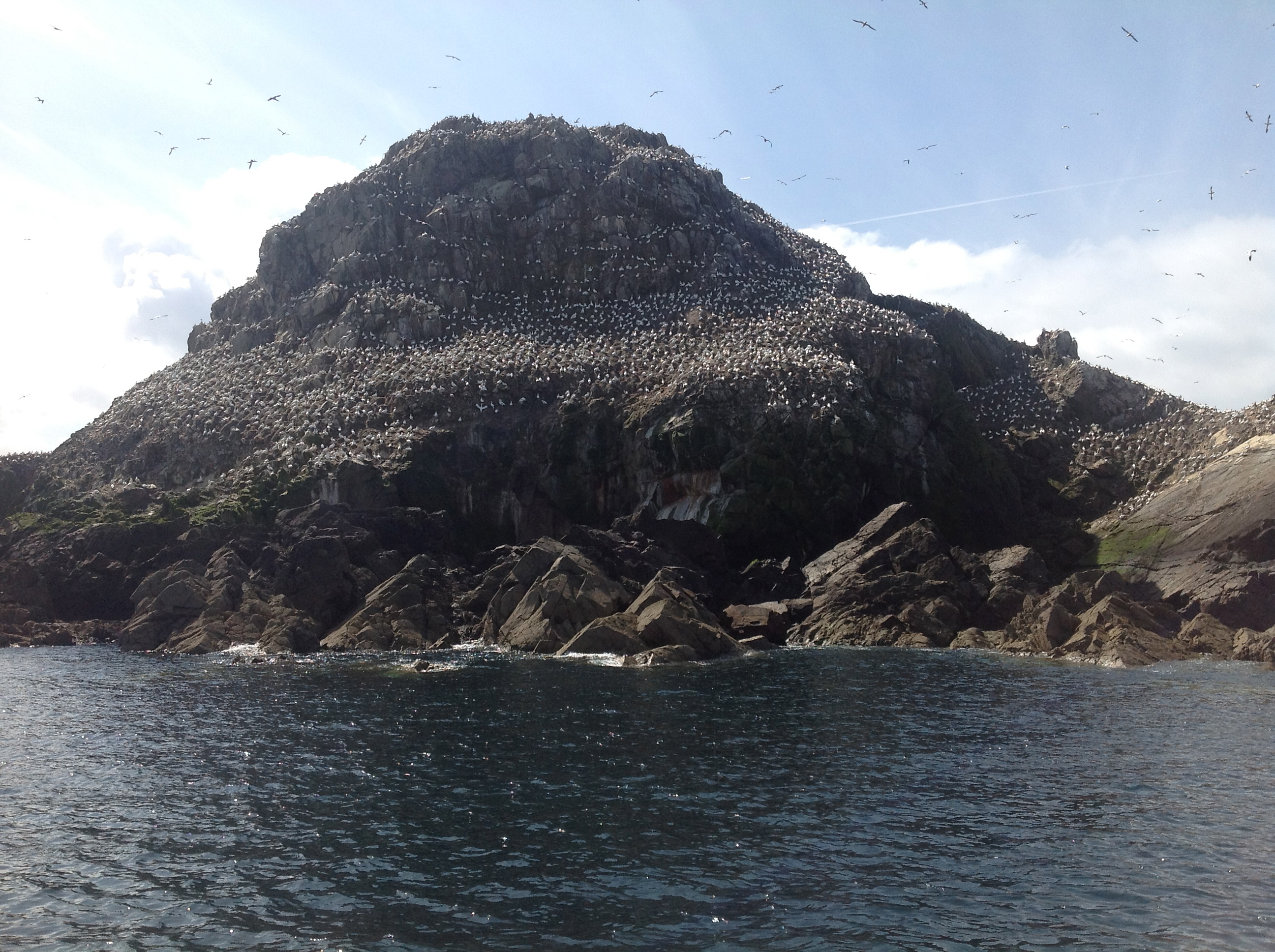 Face nord.